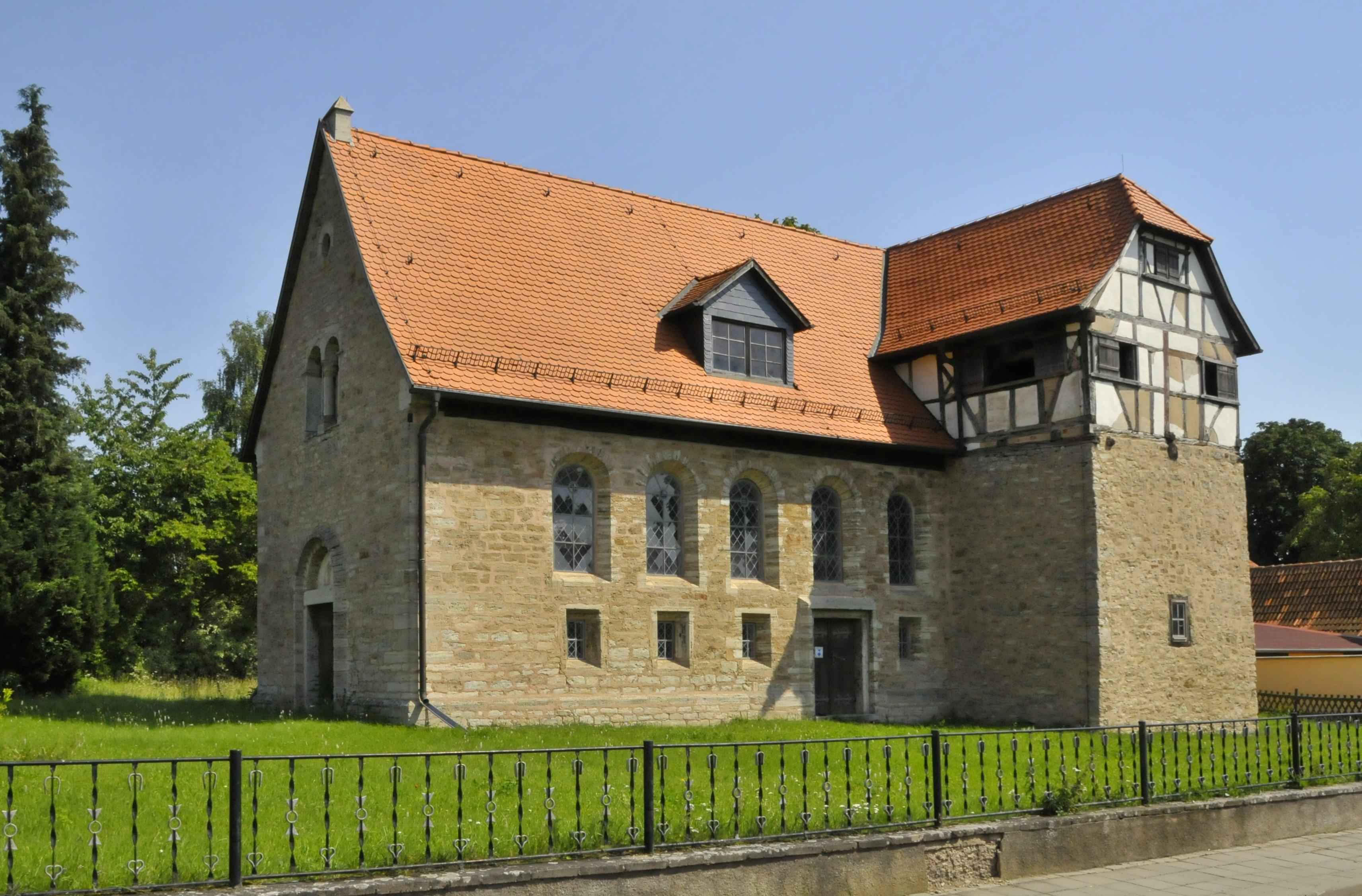 Hornsömmern, Kirche